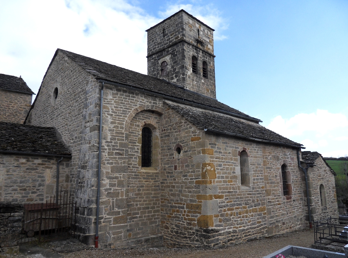 Église Saint-Dalmazy de Sévérac-le-Château (Aveyron) (Classé)